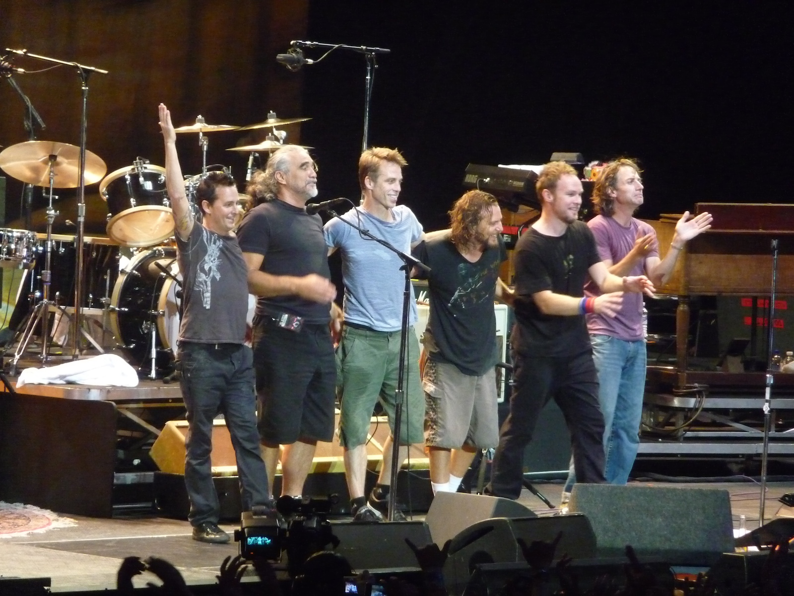 August 2009